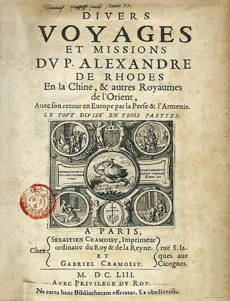 Divers voyages et missions du père Alexandre de Rhodes de la Compagnie de Jésus en la Chine et autres royaumes de l'Orient, avec son retour en Europe par la Perse et l’Arménie